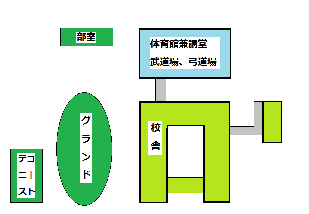 宇都宮市立豊郷中学校の簡略図